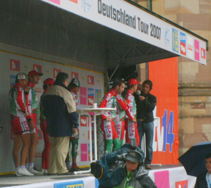 Teamvorstellung Saarbrücken, Stefan Rucker,Harald Starzengruber,hristian Pfannberger, Jochen Summer, Harald Totschnik, Thomas Rohregger, Wolfgang Murer, Stefan Denifl.